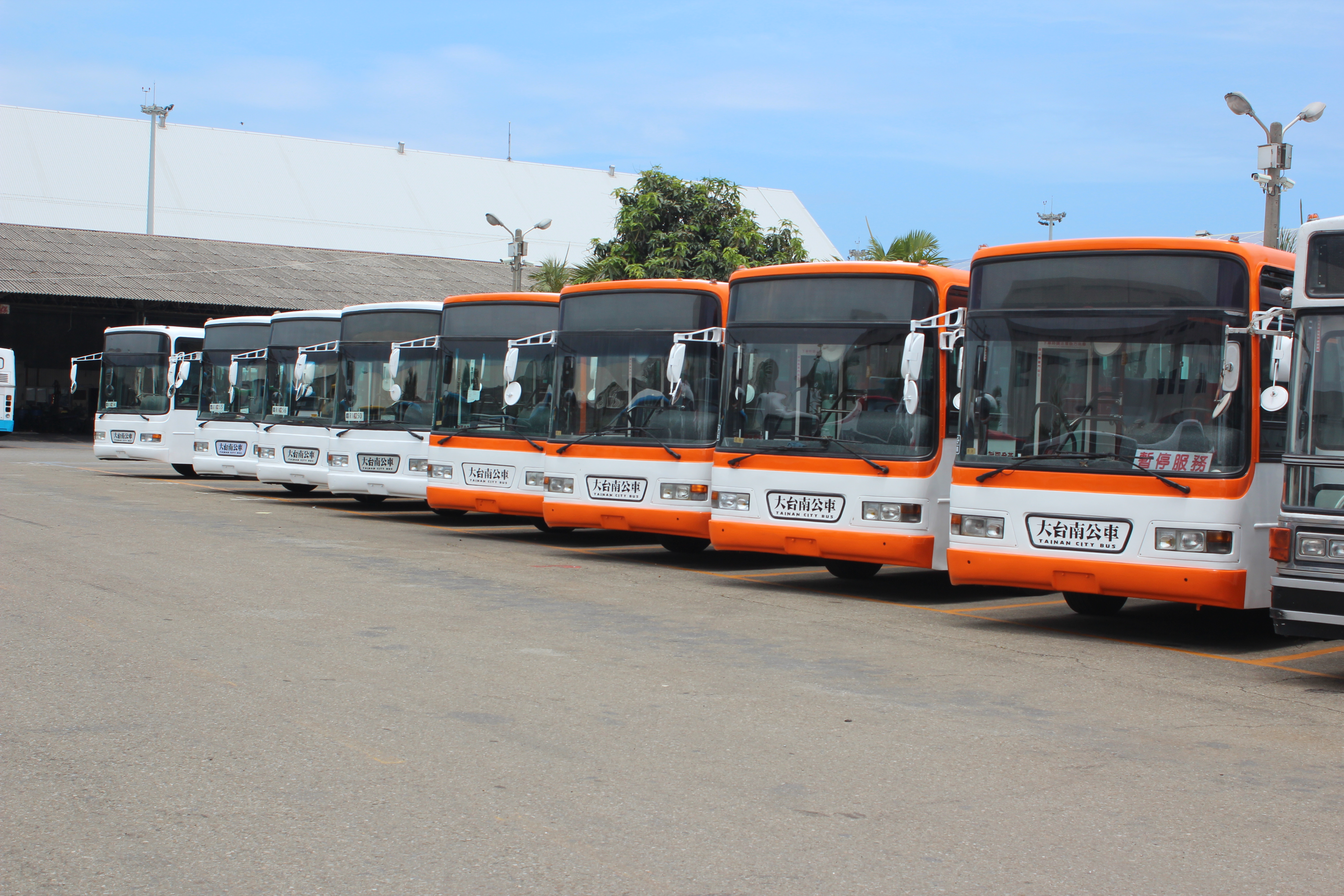 2014年興南客運向台北客運購置2007年日野RK8JRSA四期大窗車。